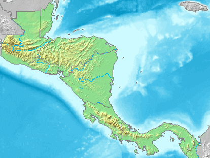 Mapa del Subcontinente centroamericano